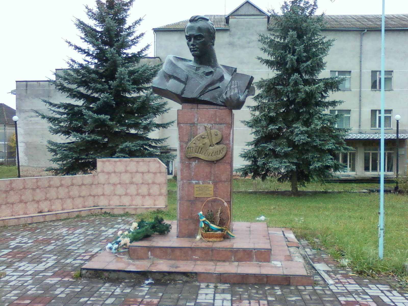 Памятник Тарасу Шевченко в пгт. Великий Любень (Городокский район Львовской области)